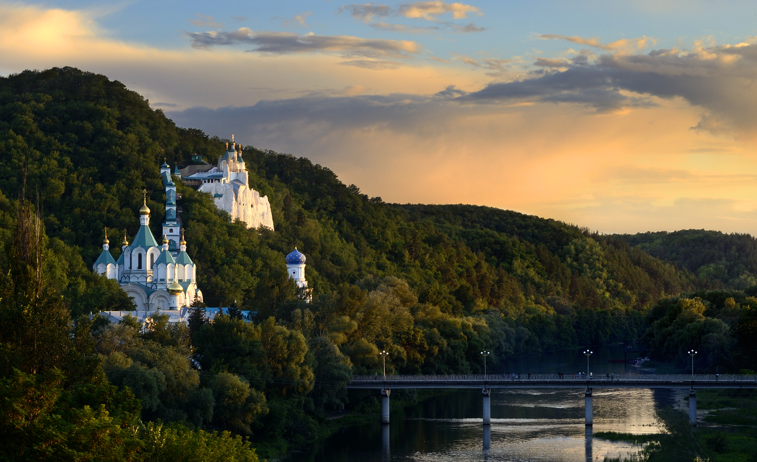 Свято-Успенська Святогірська Лавра